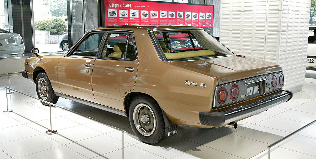 Nissan Skyline C211 4-door Sedan 2000 GT-EL